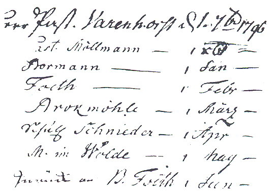 Scan eines Fotos einer Namensliste der Menslager Lesegesellschaft von 1796 aus dem Buch "Über Revolutionen, ihre Quellen und die Mittel dagegen" von Johann Ludwig Ewald, 1793